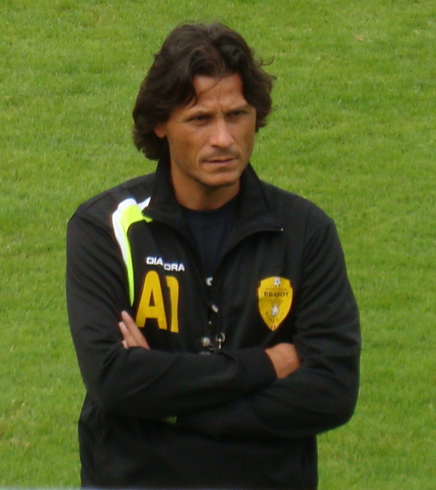 Nicolo Napoli at FC Brașov